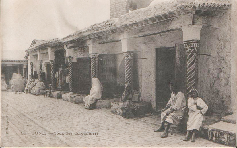 Médina de Tunis: Souk des Coordonniers, édition Le Deley